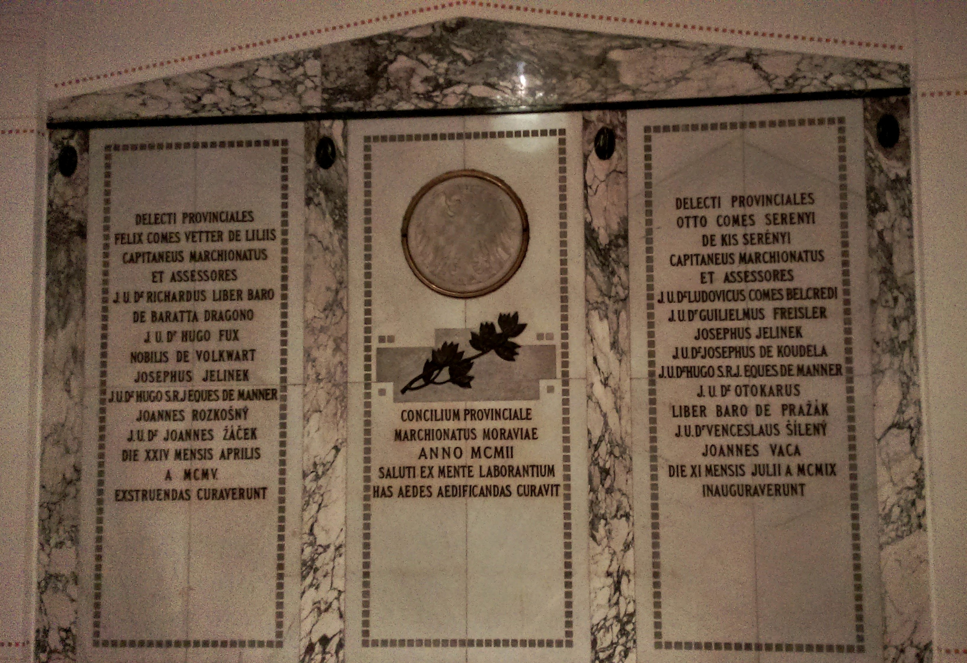 Pamětní deska zakladatelům Psychiatrické léčebny Kroměříž